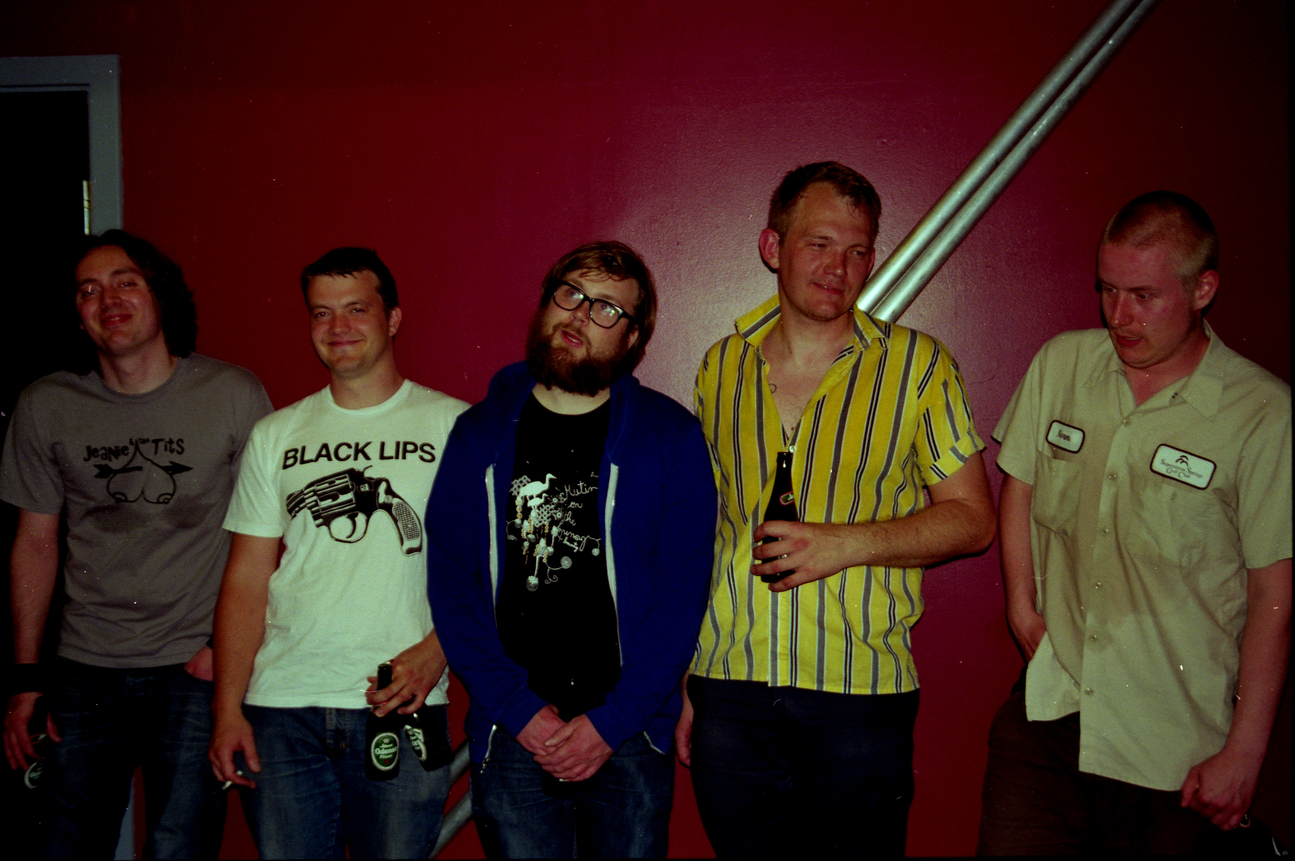 Cola Freaks, 2008.